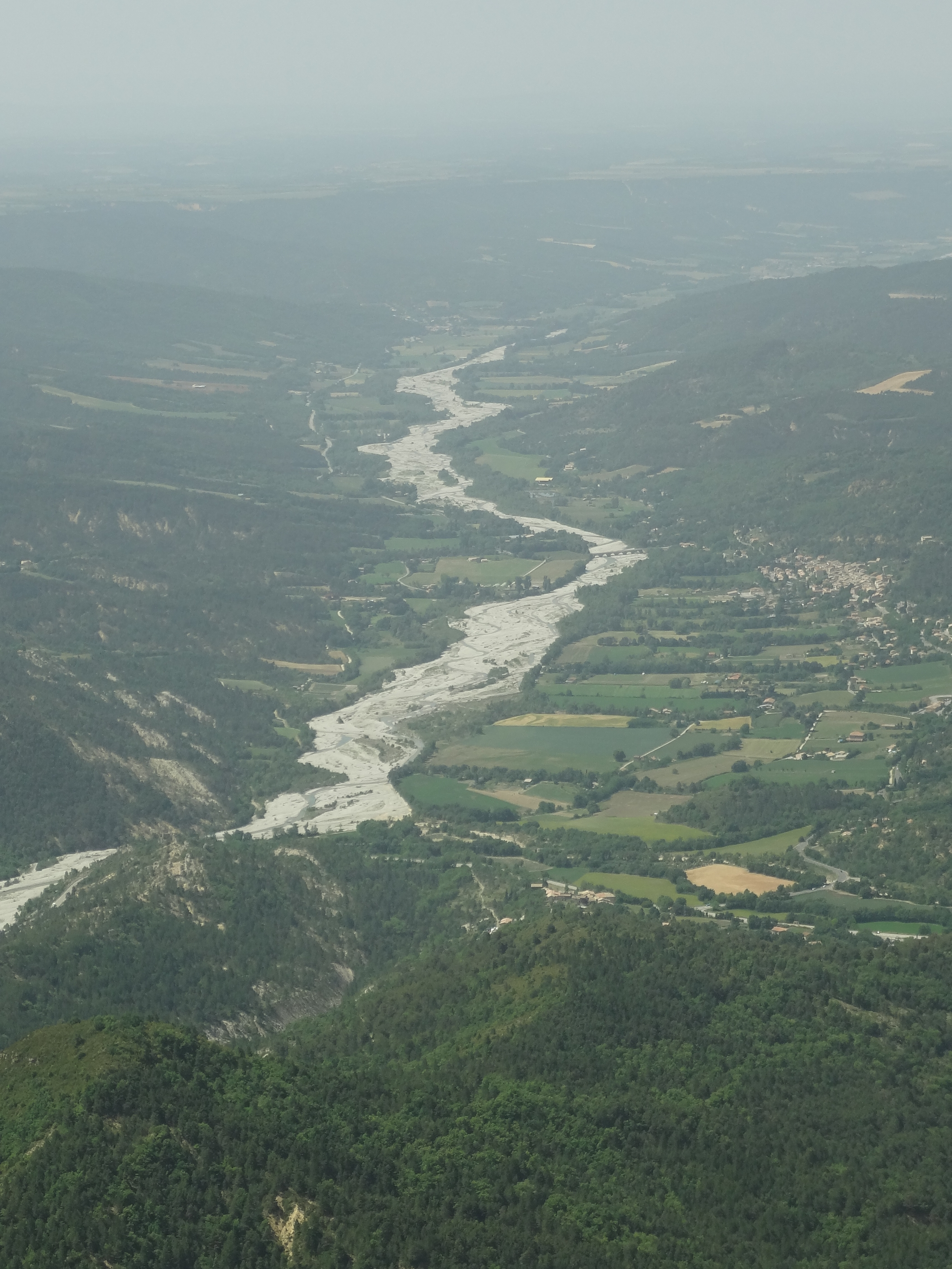 Vallée de l'Asse vue du Cousson